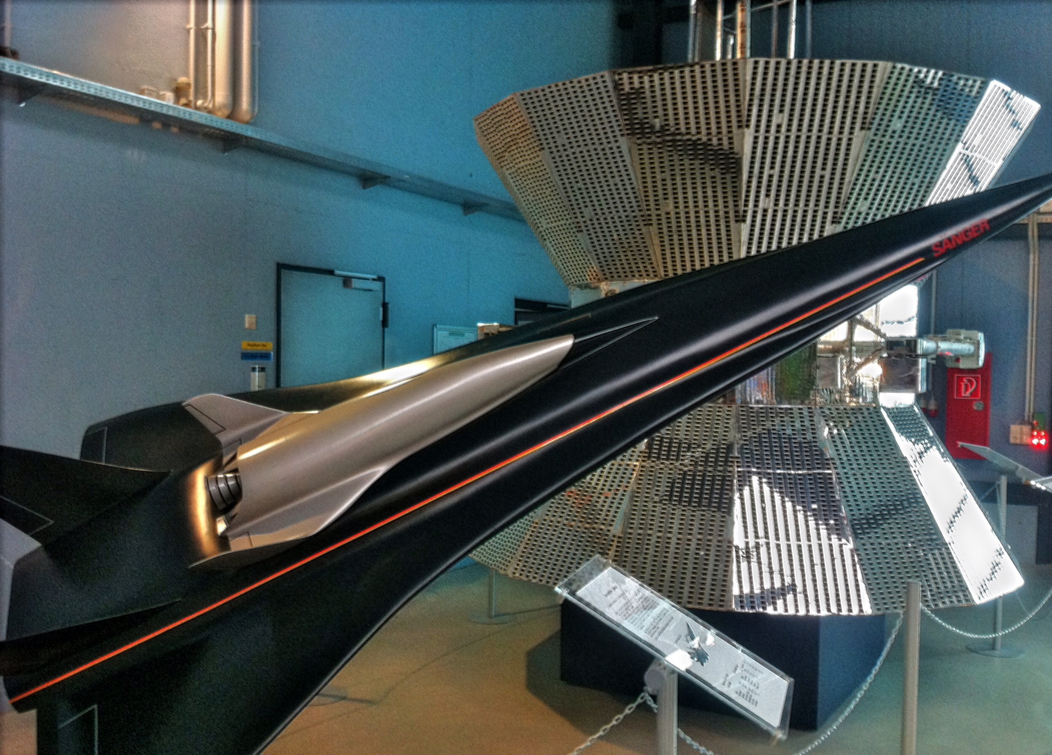 Spaceshuttlemodell auf der Raumfahrtausstellung in Morgenröthe-Rautenkranz